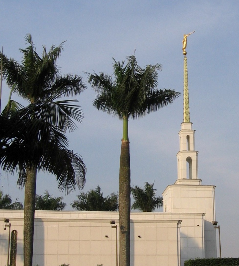 São Paulo Brazil Temple